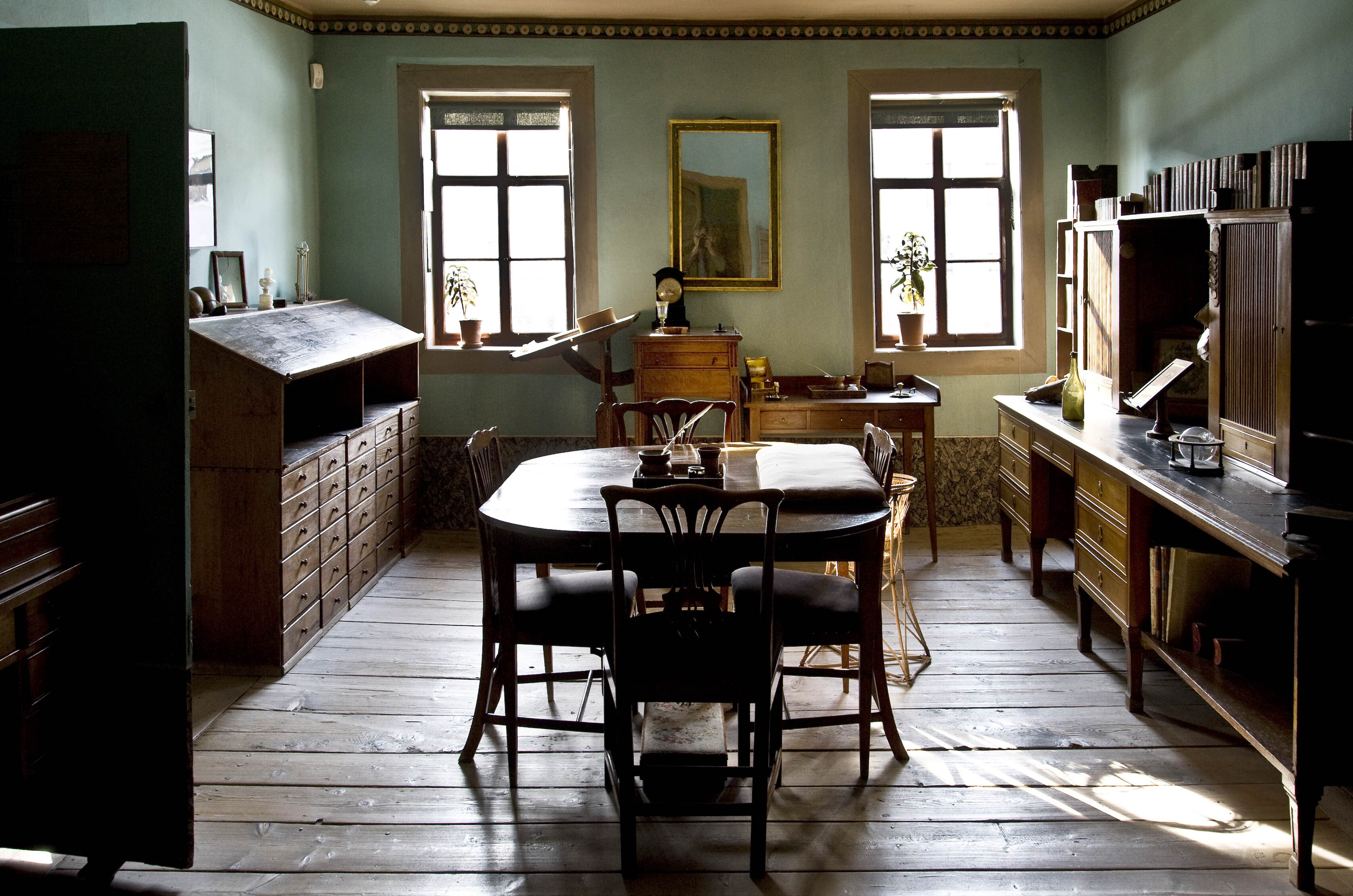 Woonhuis van Goethe in Weimar, zijn werkkamer in het ochtendlicht (2013).